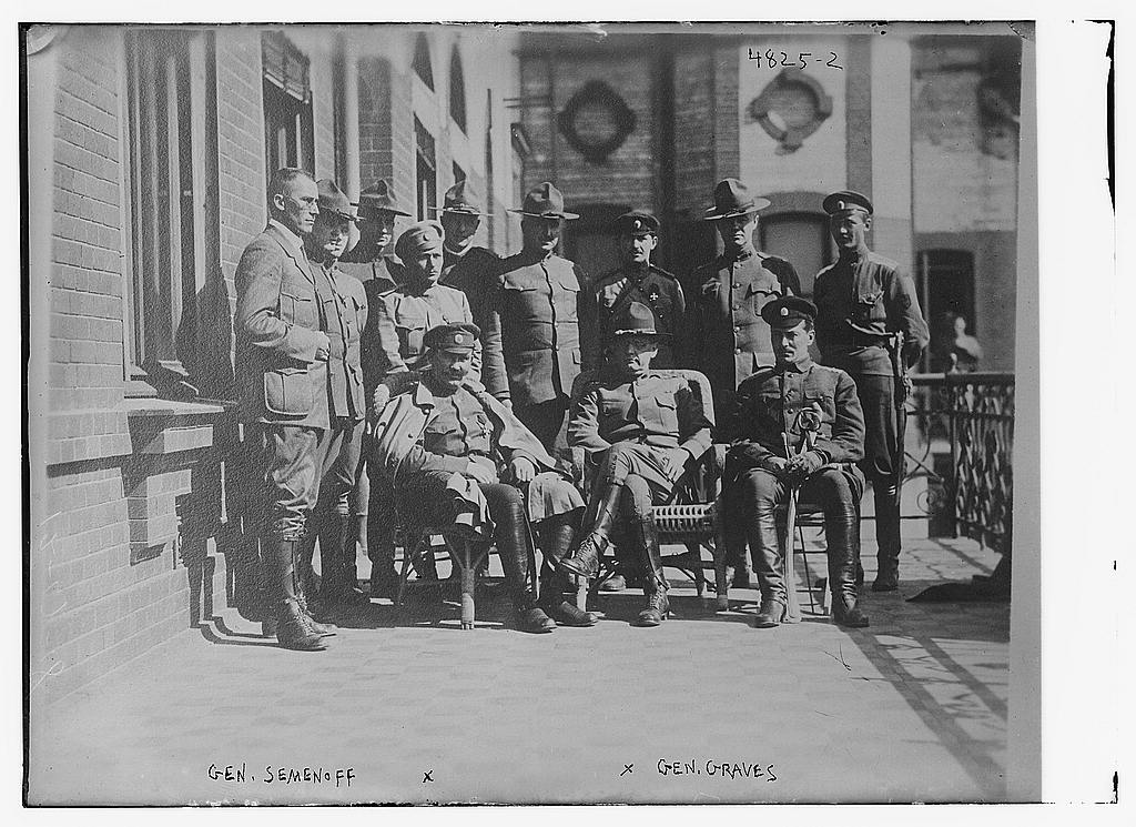 El atamán cosaco Grigorii Semenov, izquierda, sentado, junto al general norteamericano Graves durante la guerra civil rusa.